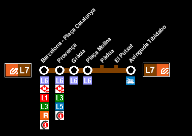 Imagen diseñada por mi de la línea 7